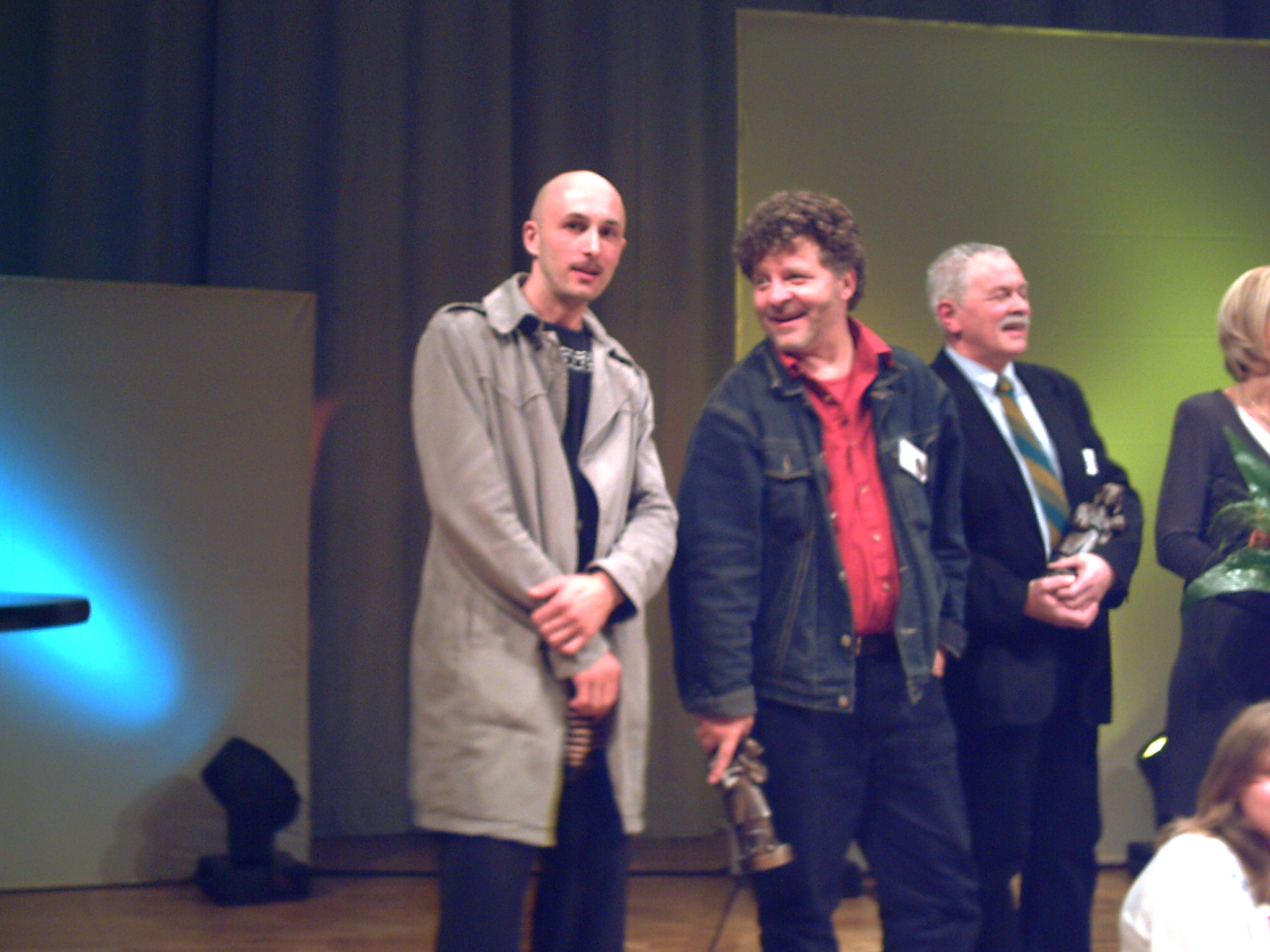 Buchkünstler Aljoscha Blau und Nikolaus Heidelbach sowie Wolfgang J. Fuchs, der Übersetzer von Brian Fies (von links) als Preisträger des Deutschen Jugendliteraturpreises 2007. / Artist Aljoscha Blau and author Nikolaus Heidelbach with their German Young Literature Awards, at the Frankfurt Book Fair 2007.